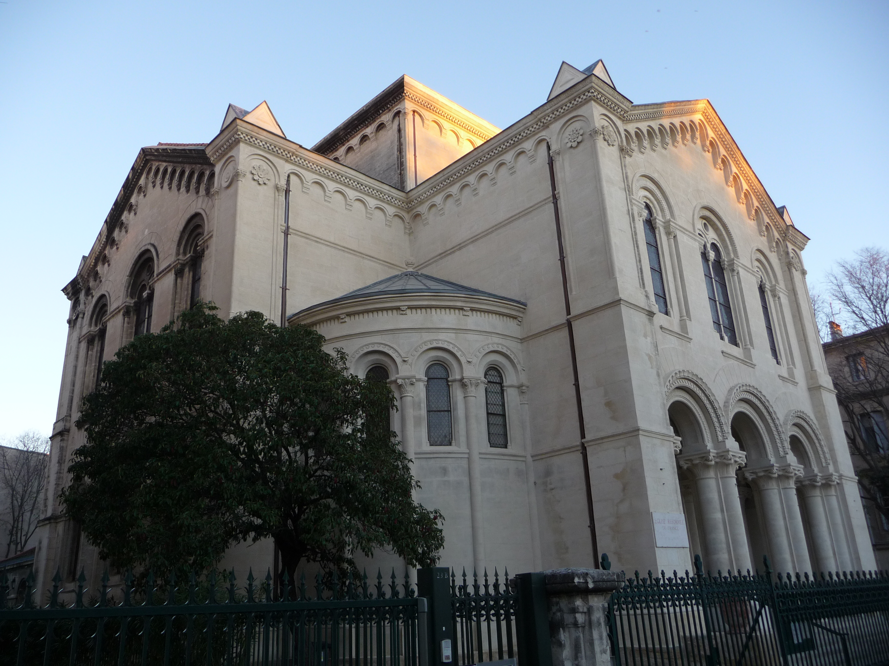 Temple de l'església reformada (Montpeller) .